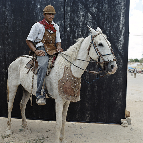 Vaqueiro. Photographie extraite d'une série de portraits de vaqueiros, faite à Buique, Pernambuco, Brasil.